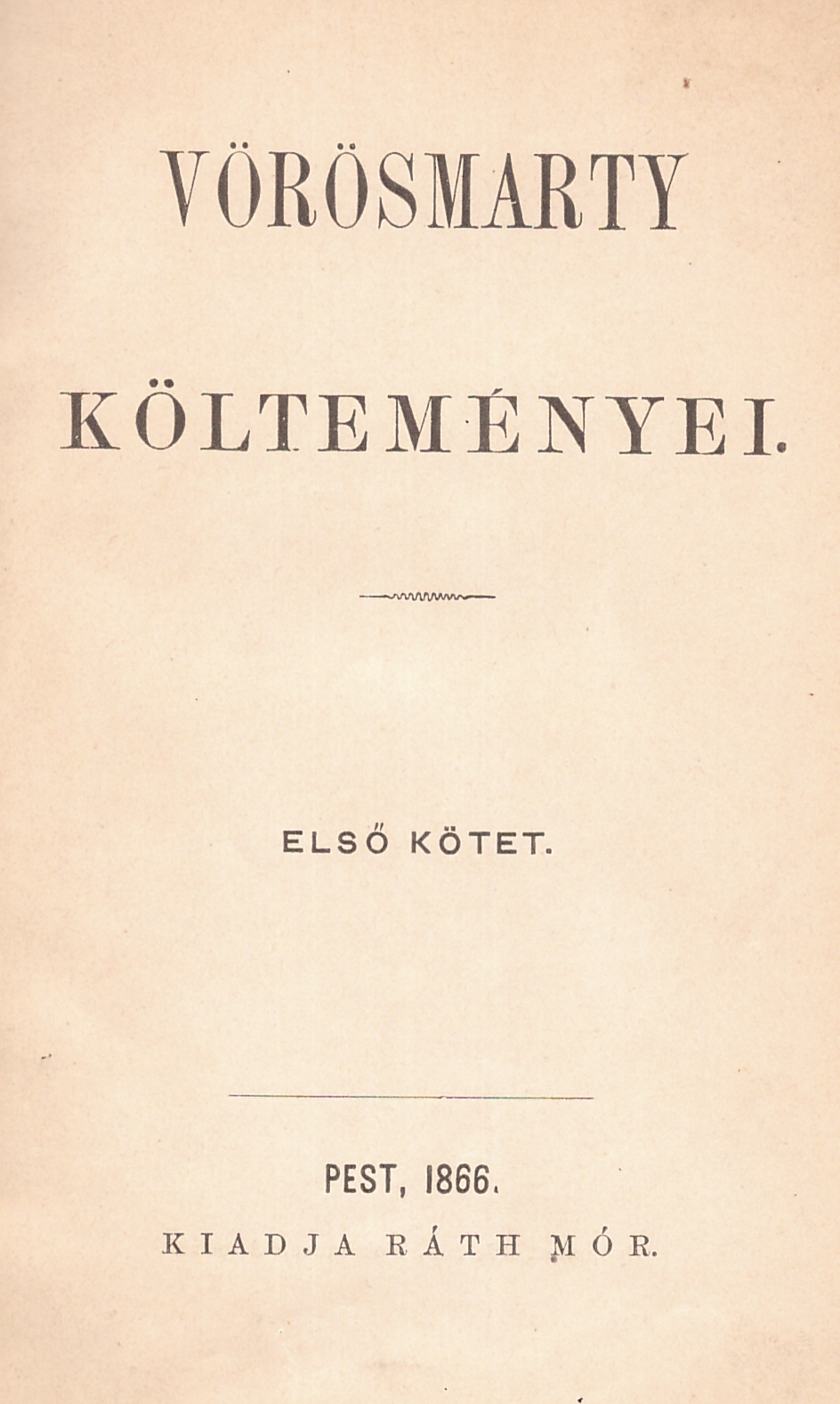 Vörösmarty Mihály (1800-1855) költeményeinek 1866-os kiadása